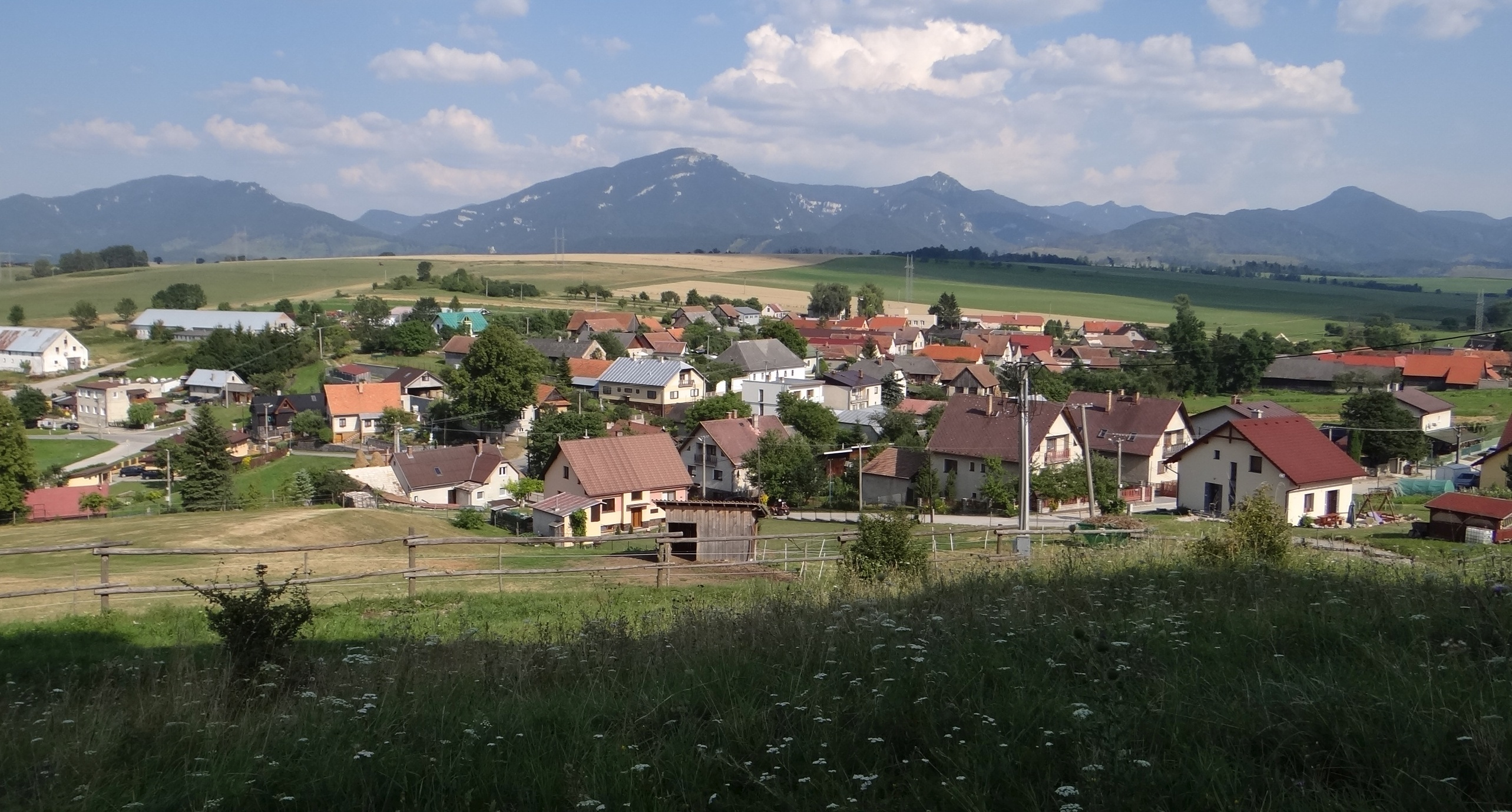 Socovce